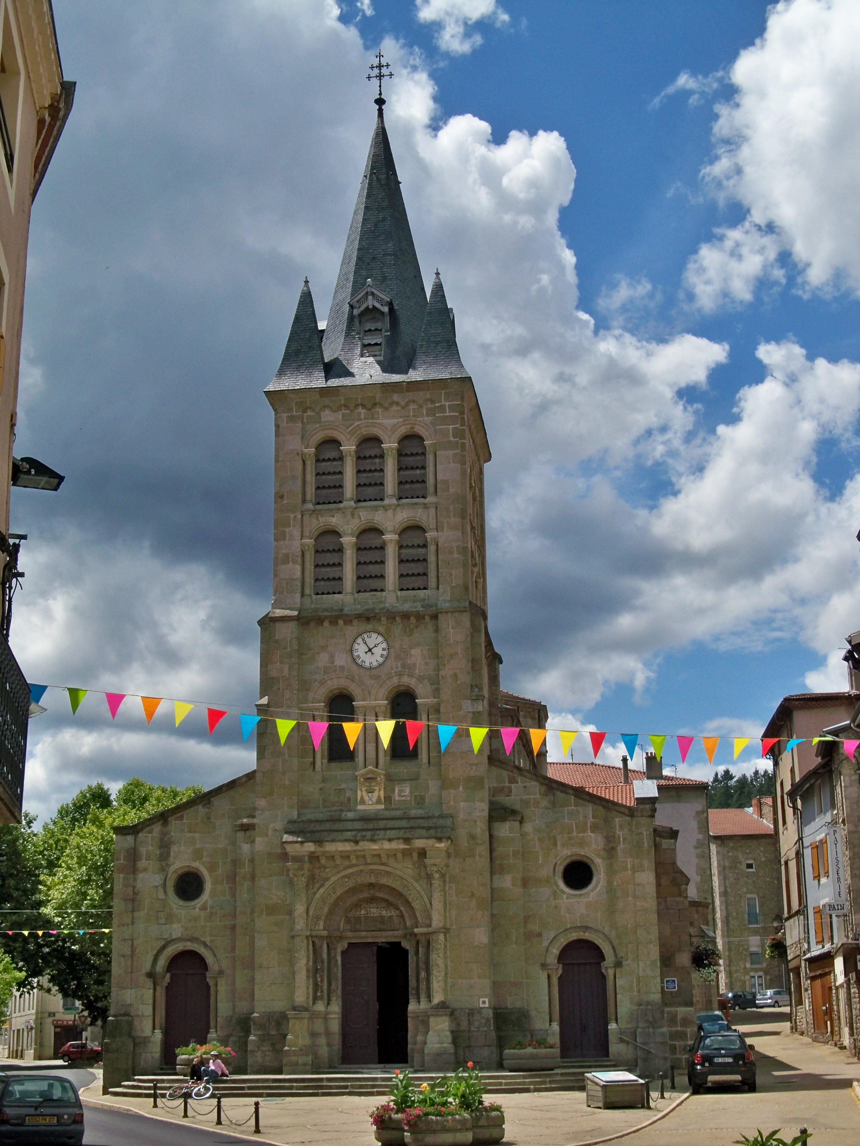 Facade Église Saint-André (Bourg-Argental)